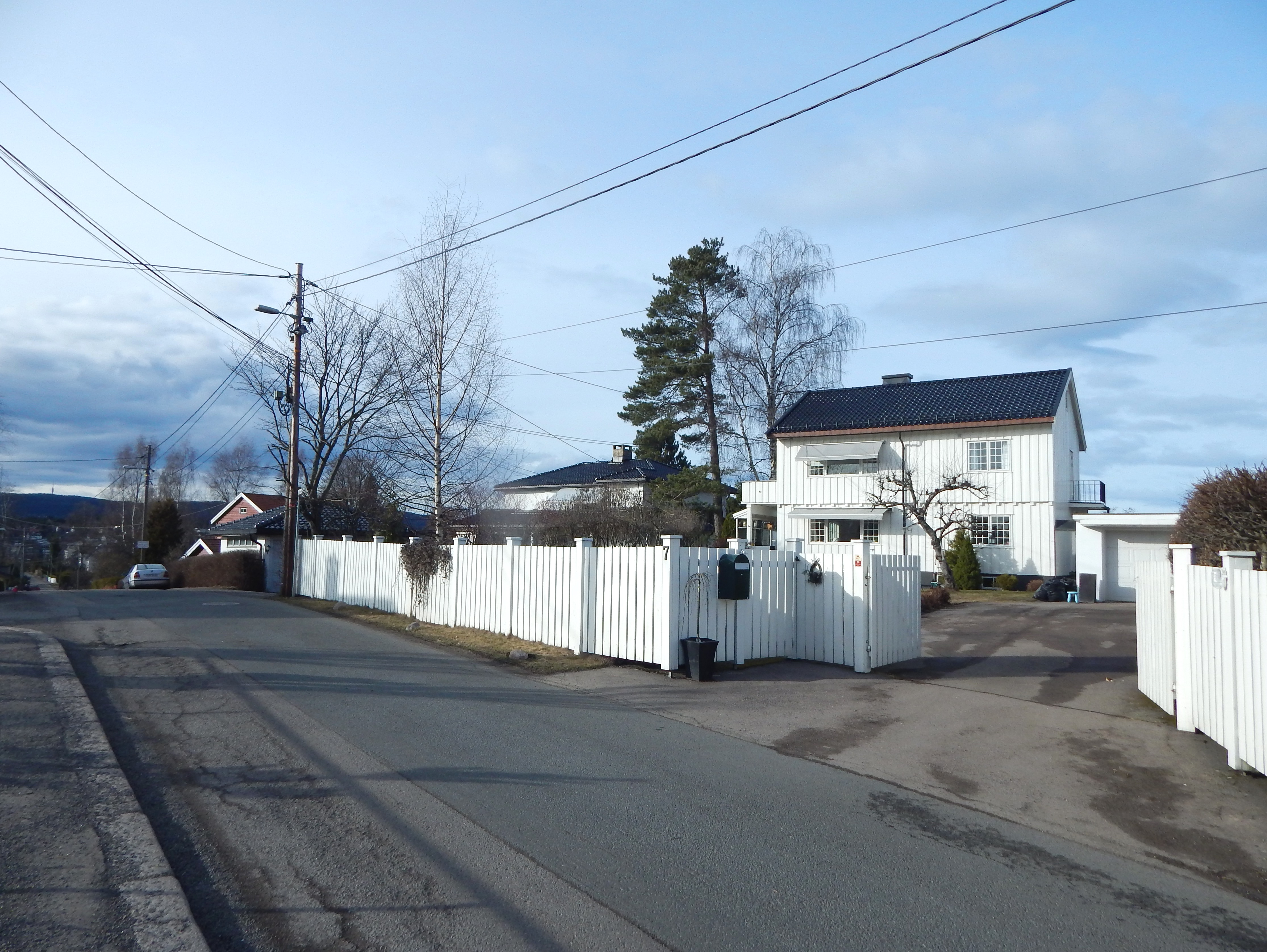 Saturnveien på Grefsenplatået, ved nr. 7